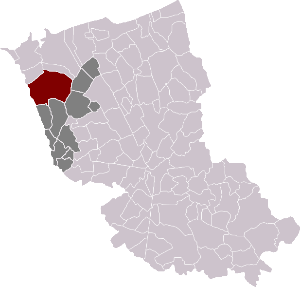 Locatie gemeente Broekburg in arrondissement Duinkerke. Zelfgemaakt. Location of Bourbourg municipality in the arrondissement of Dunkirk. Self made. Localisation de la commune de Bourbourg dans l'arrondissement de Dunkerque. Fait moi-même.